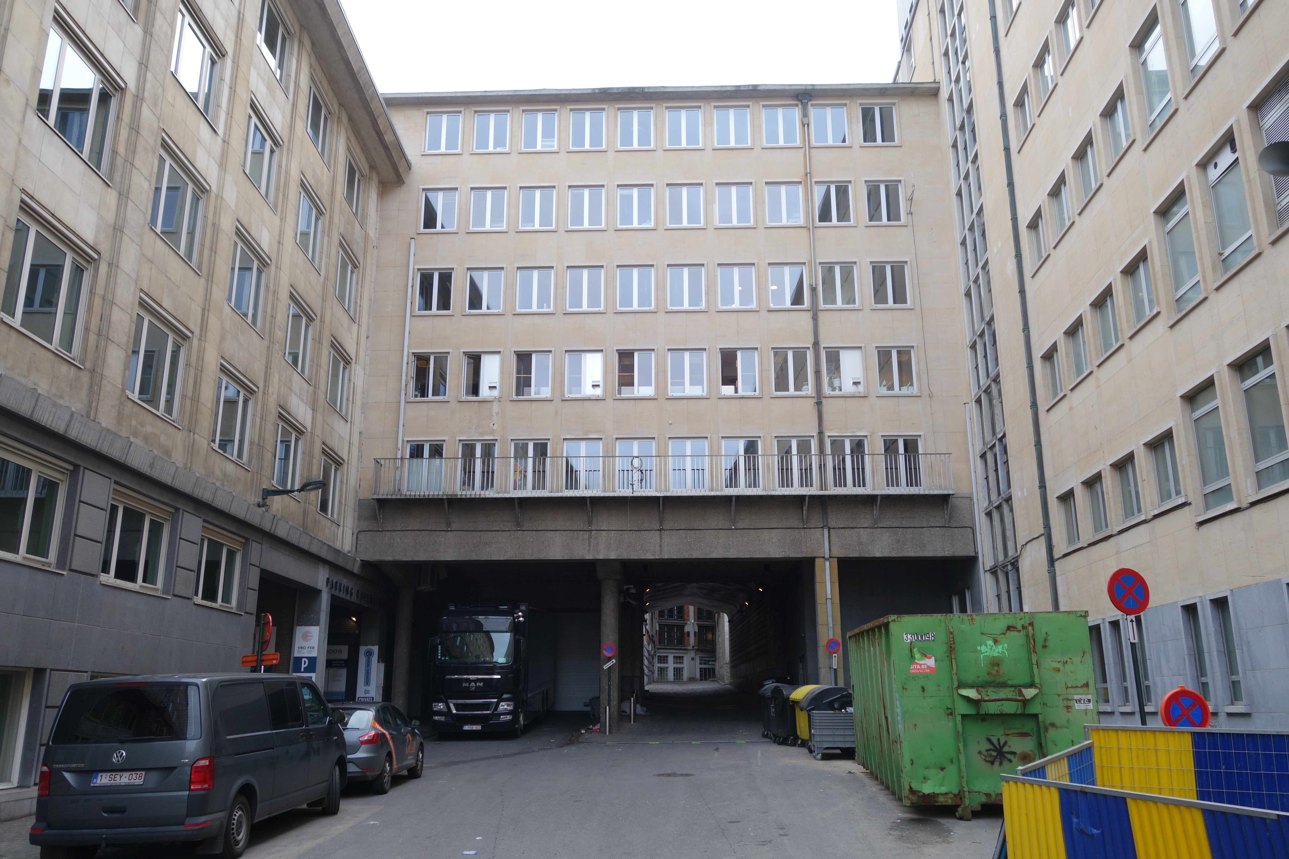 Stuiversstraat